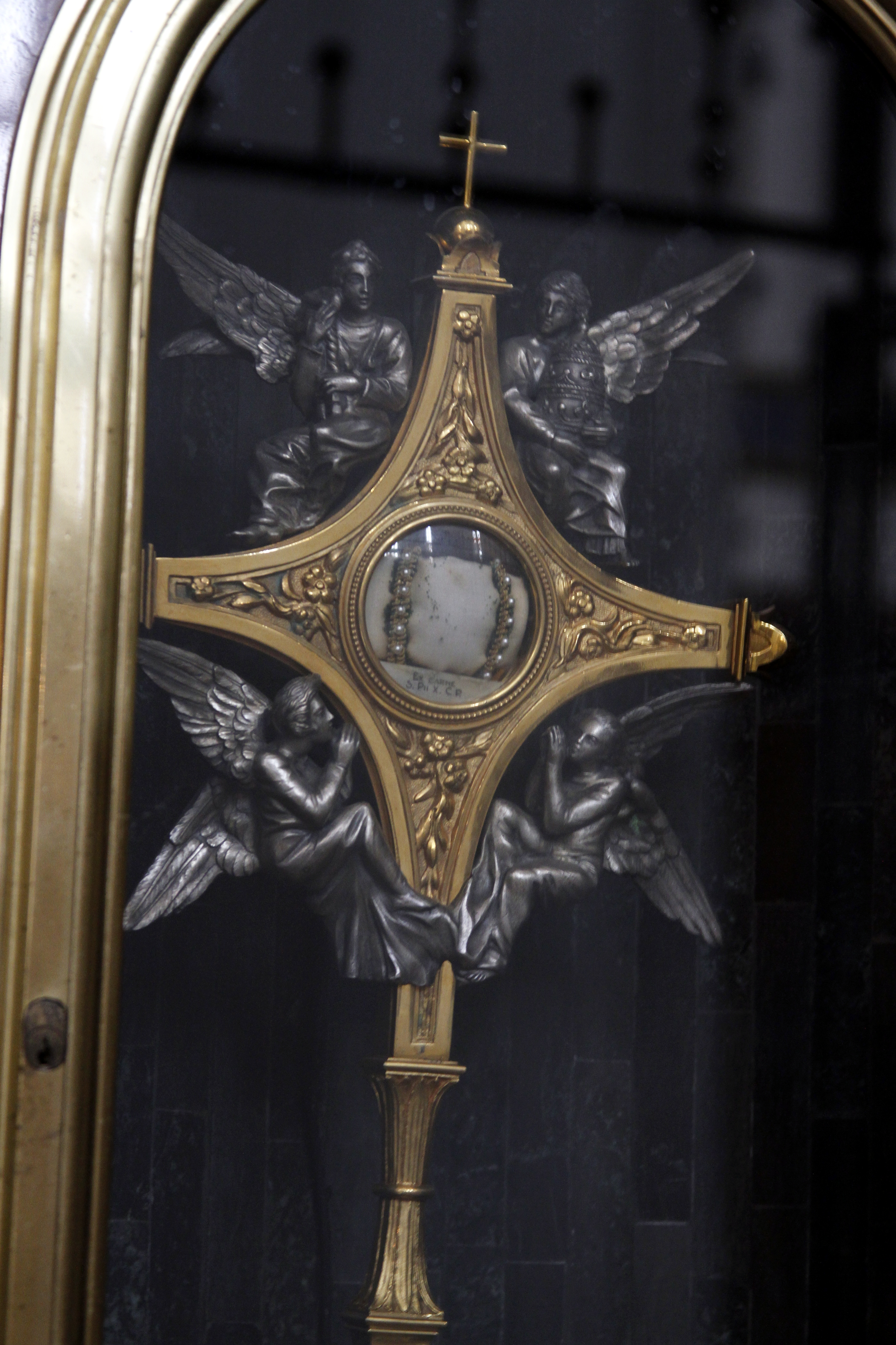 Frauenkirche - Munich - Germany